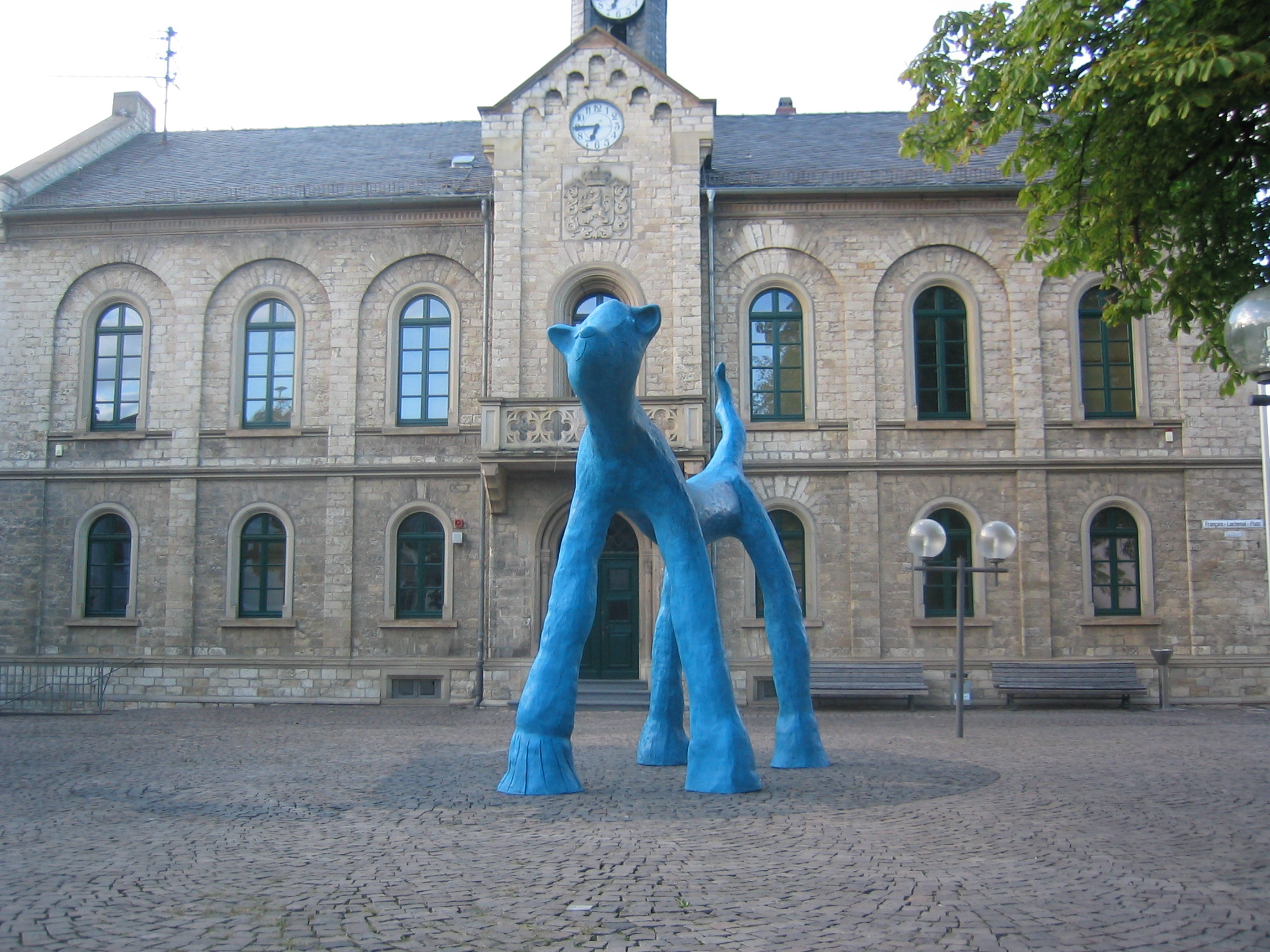 Bronze auf Rathausplatz in Ingelheim